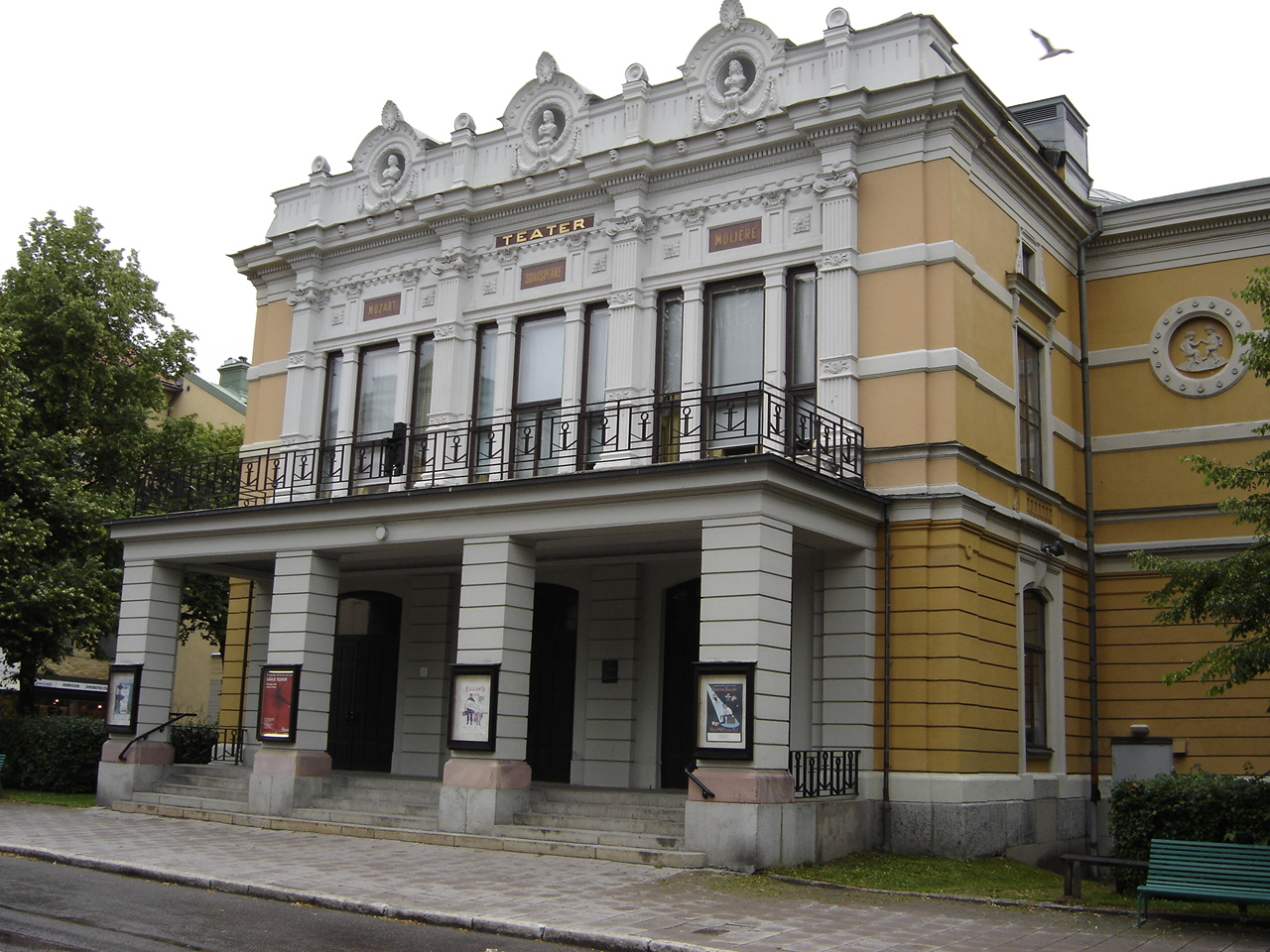 Gävle